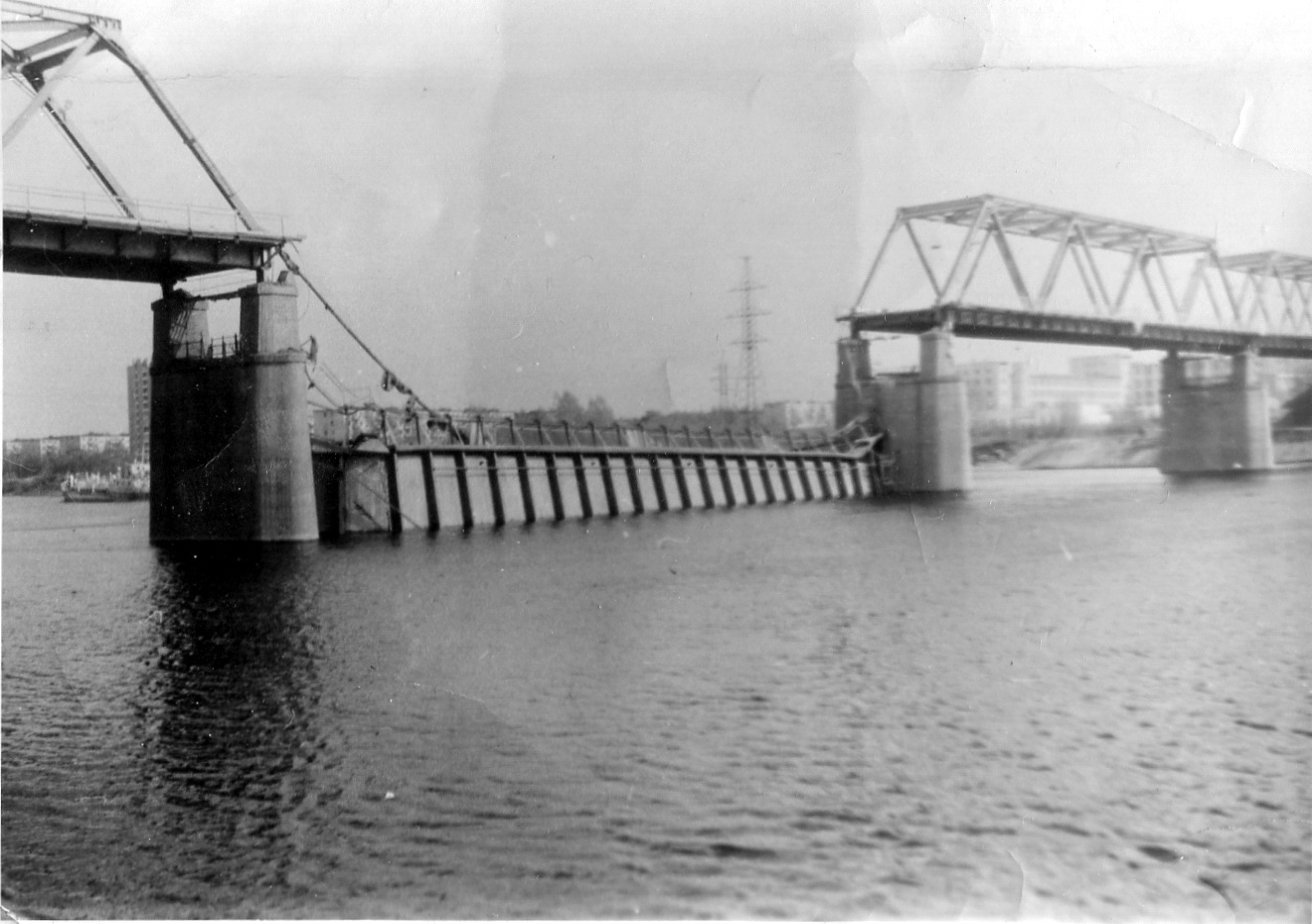 Обвал Мигаловского моста